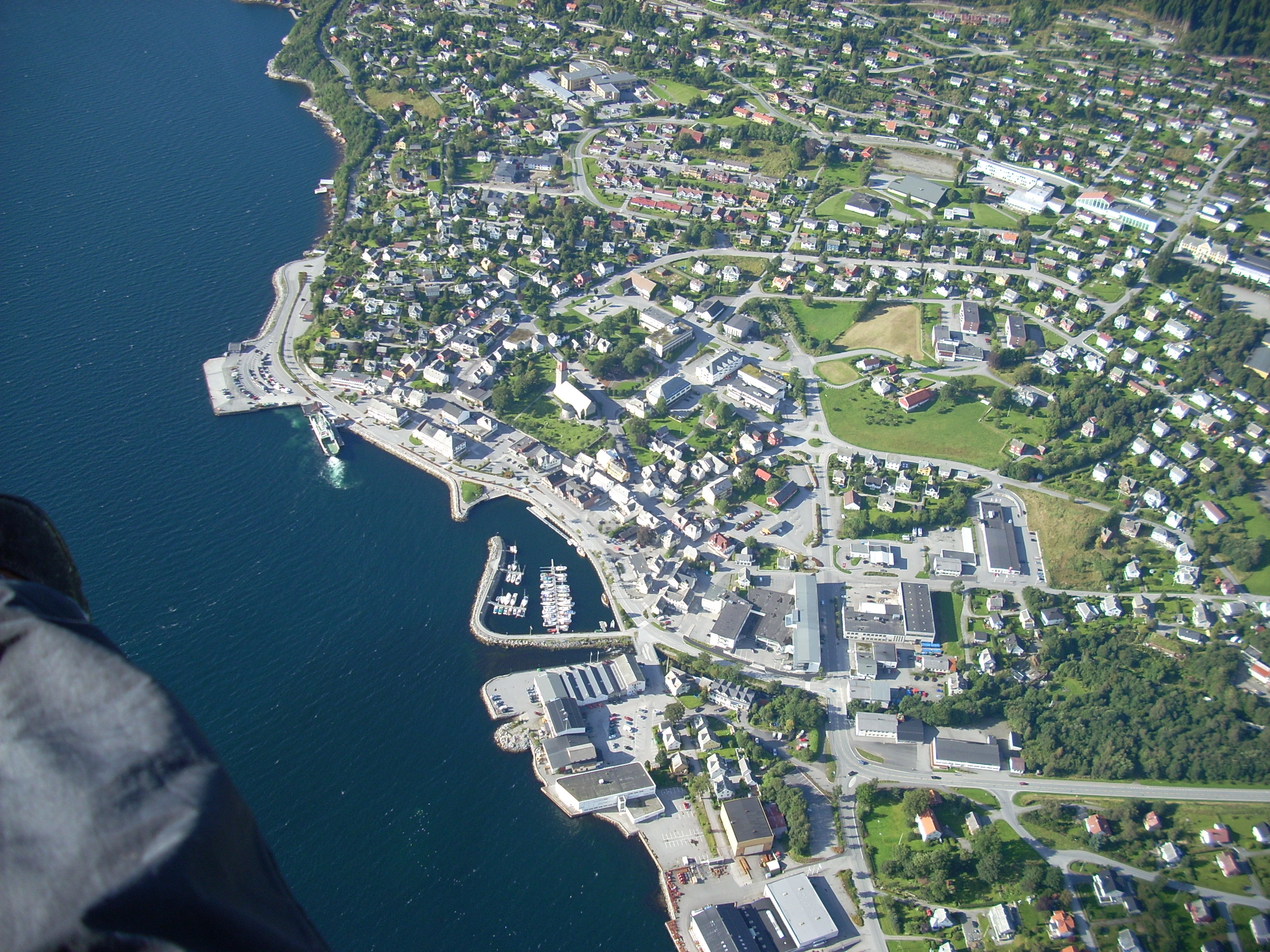 Volda sentrum